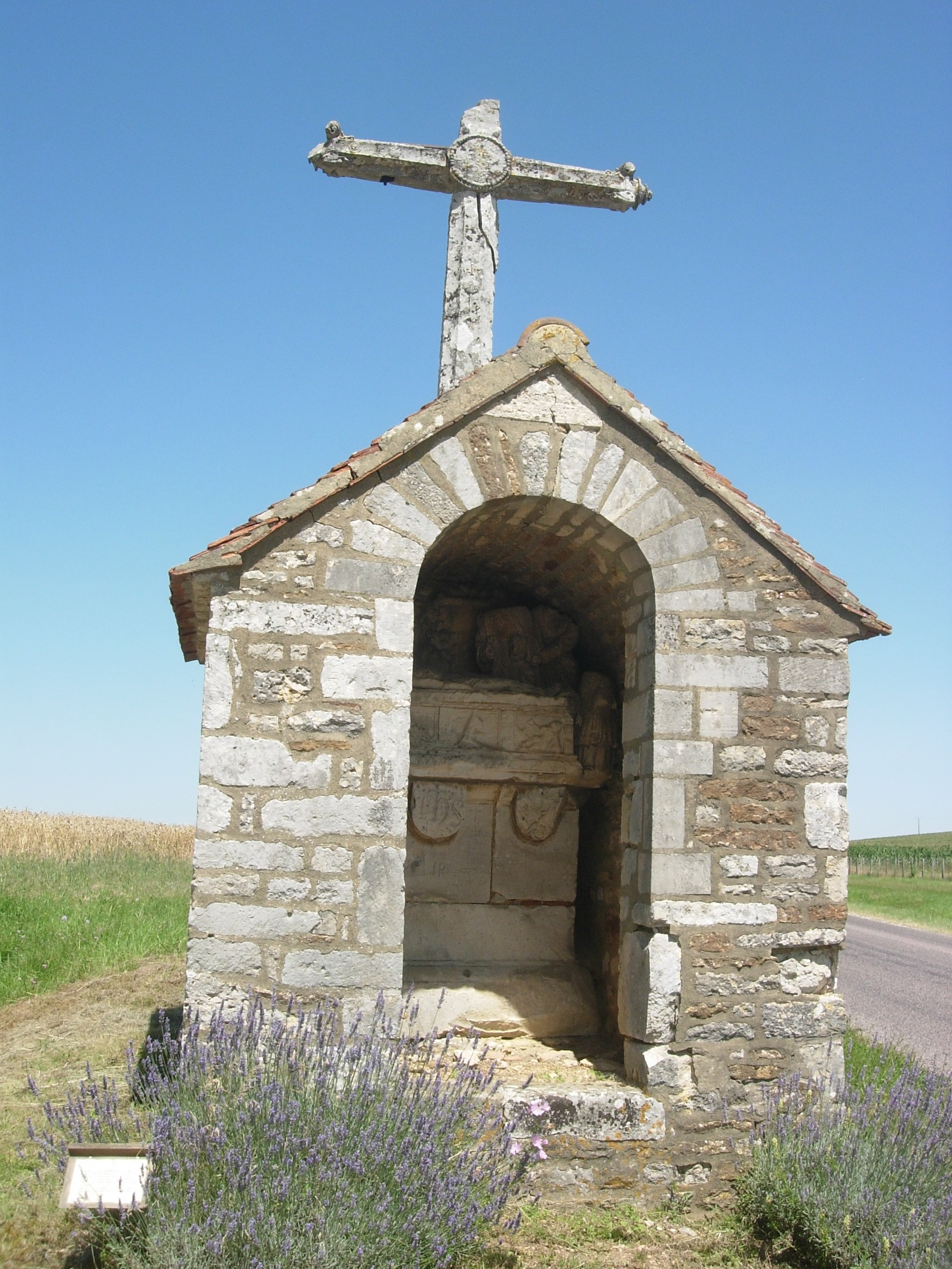 Croix avec mise au tombeau du Christ dite "Chapelle Saint Jacques" (1538) - Coussegrey (Aube) Renaissance Champenoise